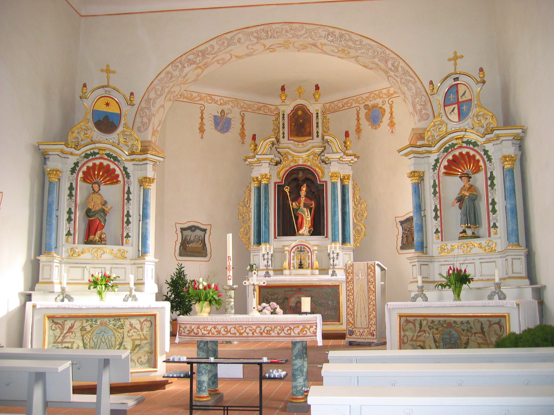 Die drei Altäre der Blasiuskapelle in Bergweiler, Gemeinde Tholey, Saarland